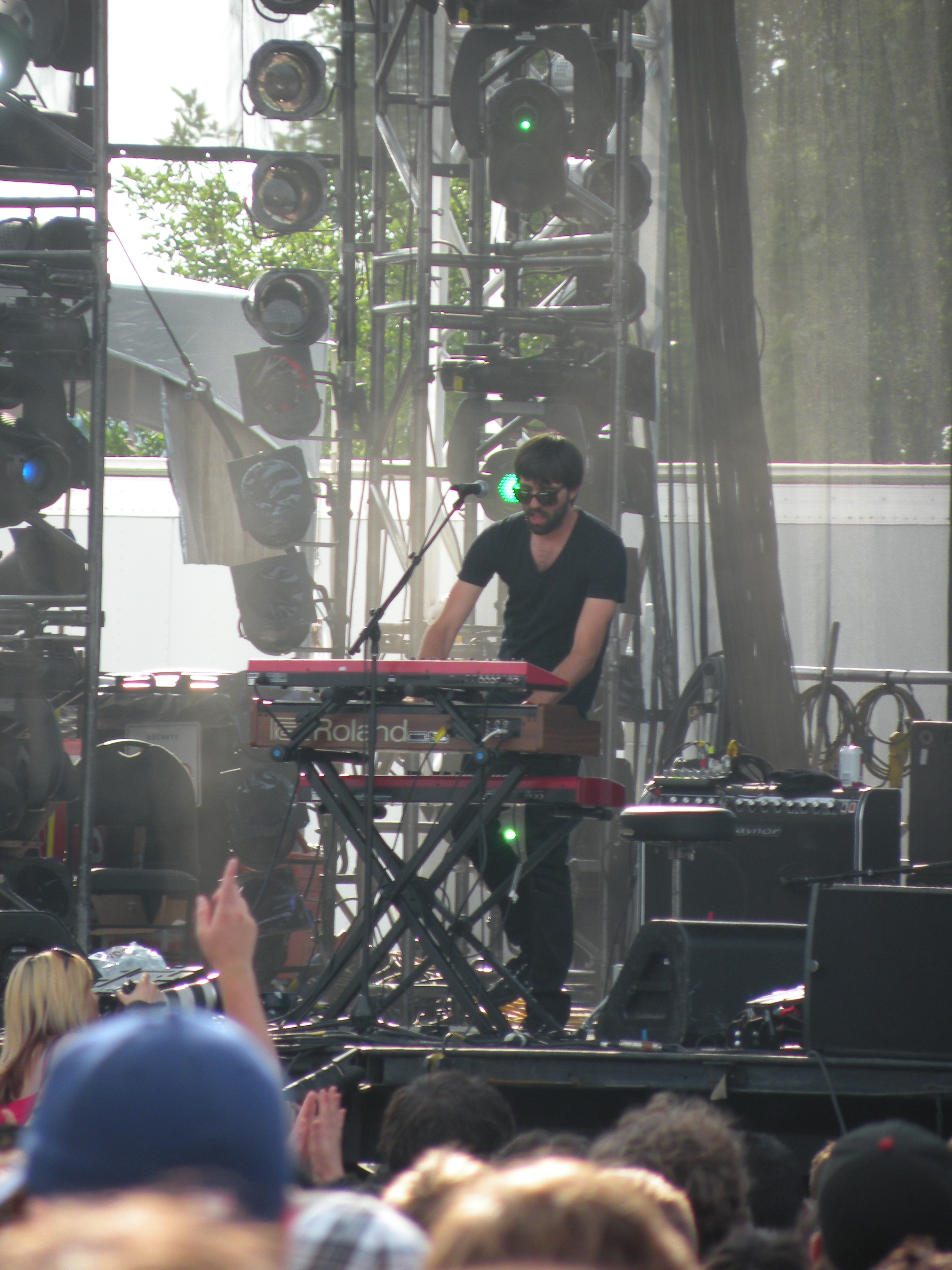 Thomas Augustin, du groupe Malajube, en concert au festival Osheaga à Montréal en 2011.